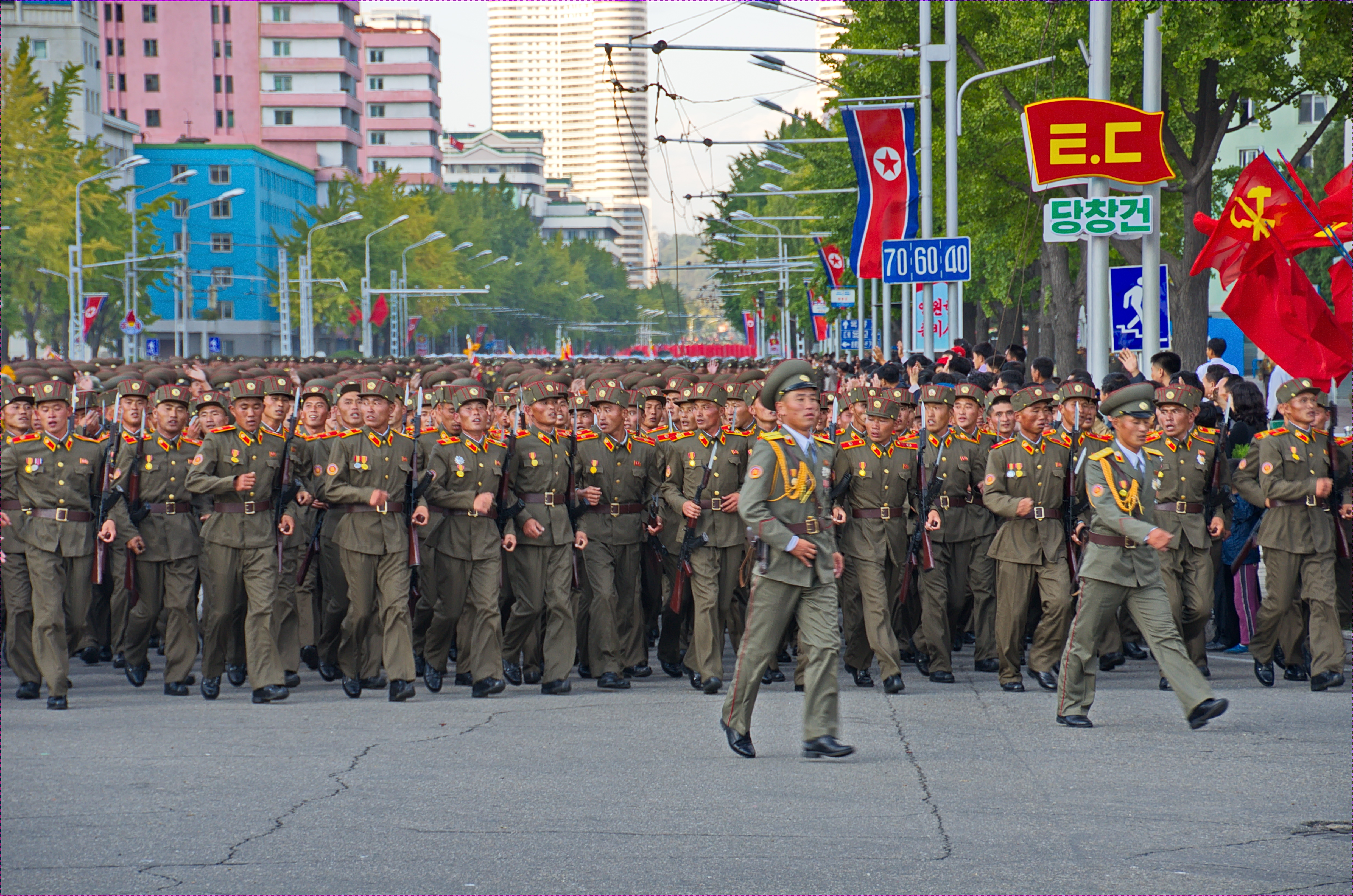 Nordkorea 2015 - Pjöngjang - Parade zum 75. JT der Arbeiterpartei